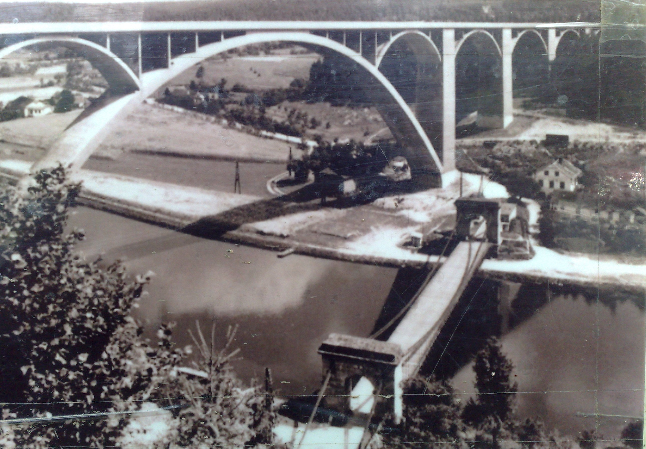 Podolský most (Podolí I v okrese Písek) se starým řetězovým mostem, který byl později přenesen do Stádlece v okrese Tábor. Česká republika.